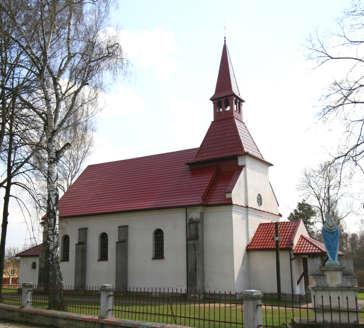 kostel+brusno+nowe